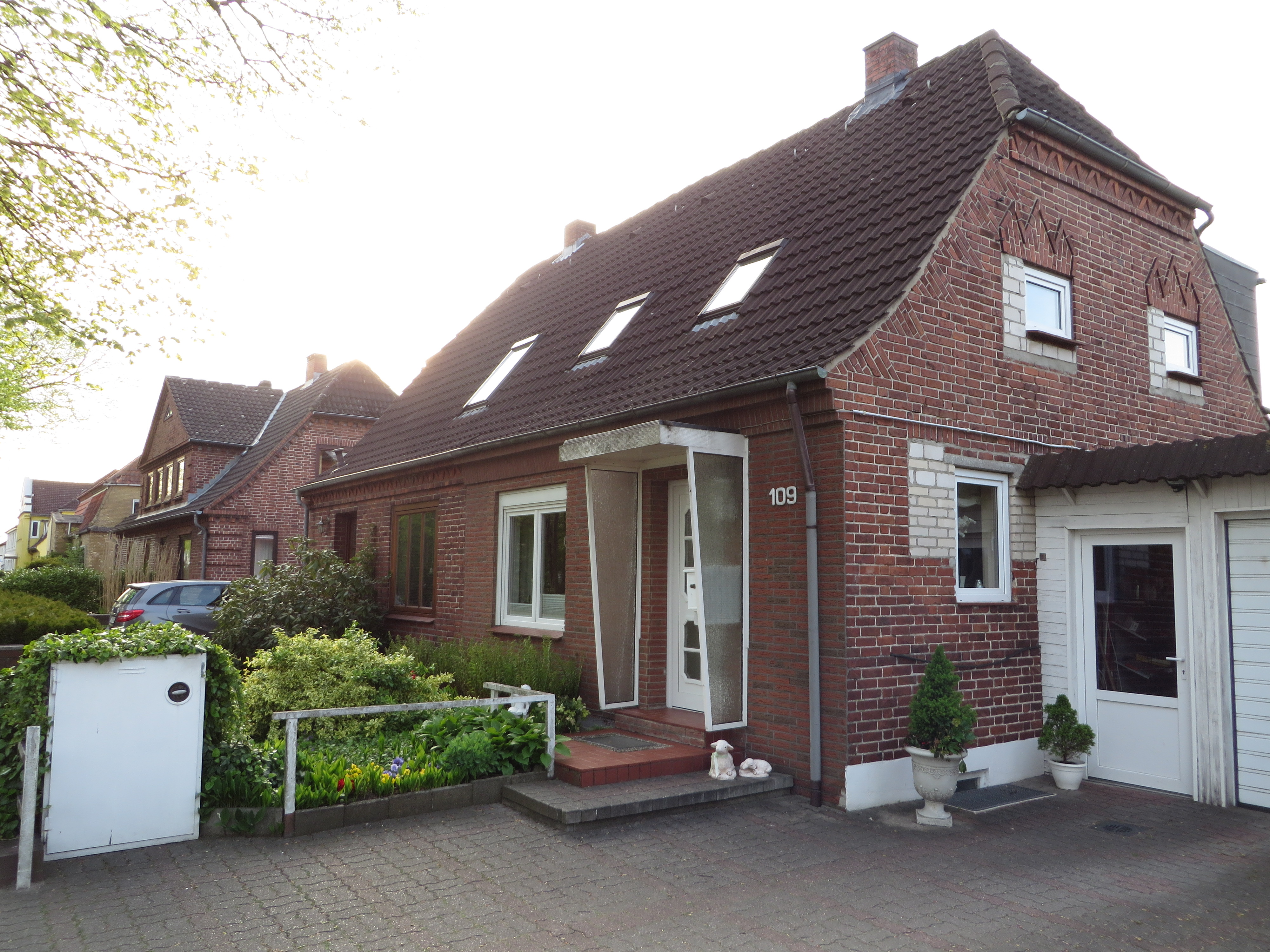 Osterallee ehemals Tirpitzstraße 107 und 109 (Flensburg-Mürwik 11 Mai 2015), Bild 07